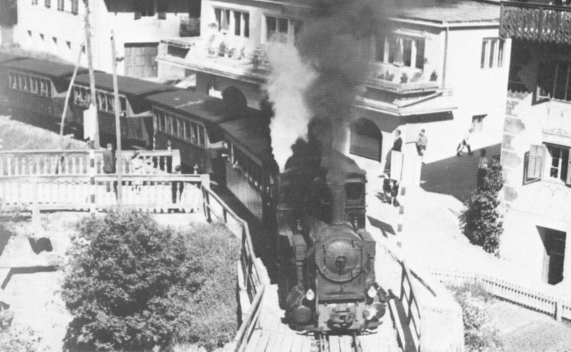 autore: ignoto provenienza: - grazie a Mauro Bottegal descrizione: Treno della ferrovia val gardena data: Licenza d'uso